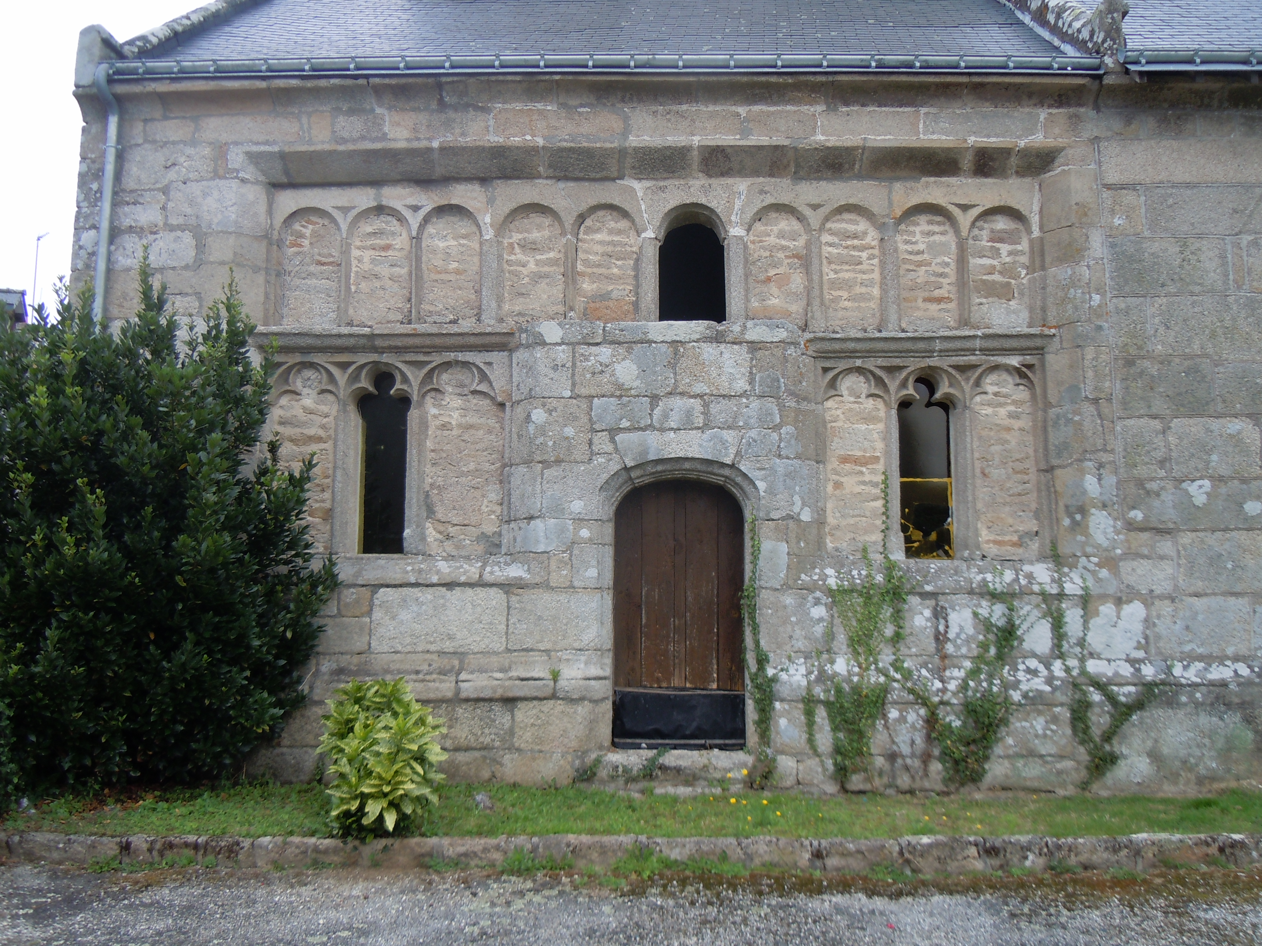 L'ossuaire de l'église paroissiale du Faouët (Morbihan), aujourd'hui muré.